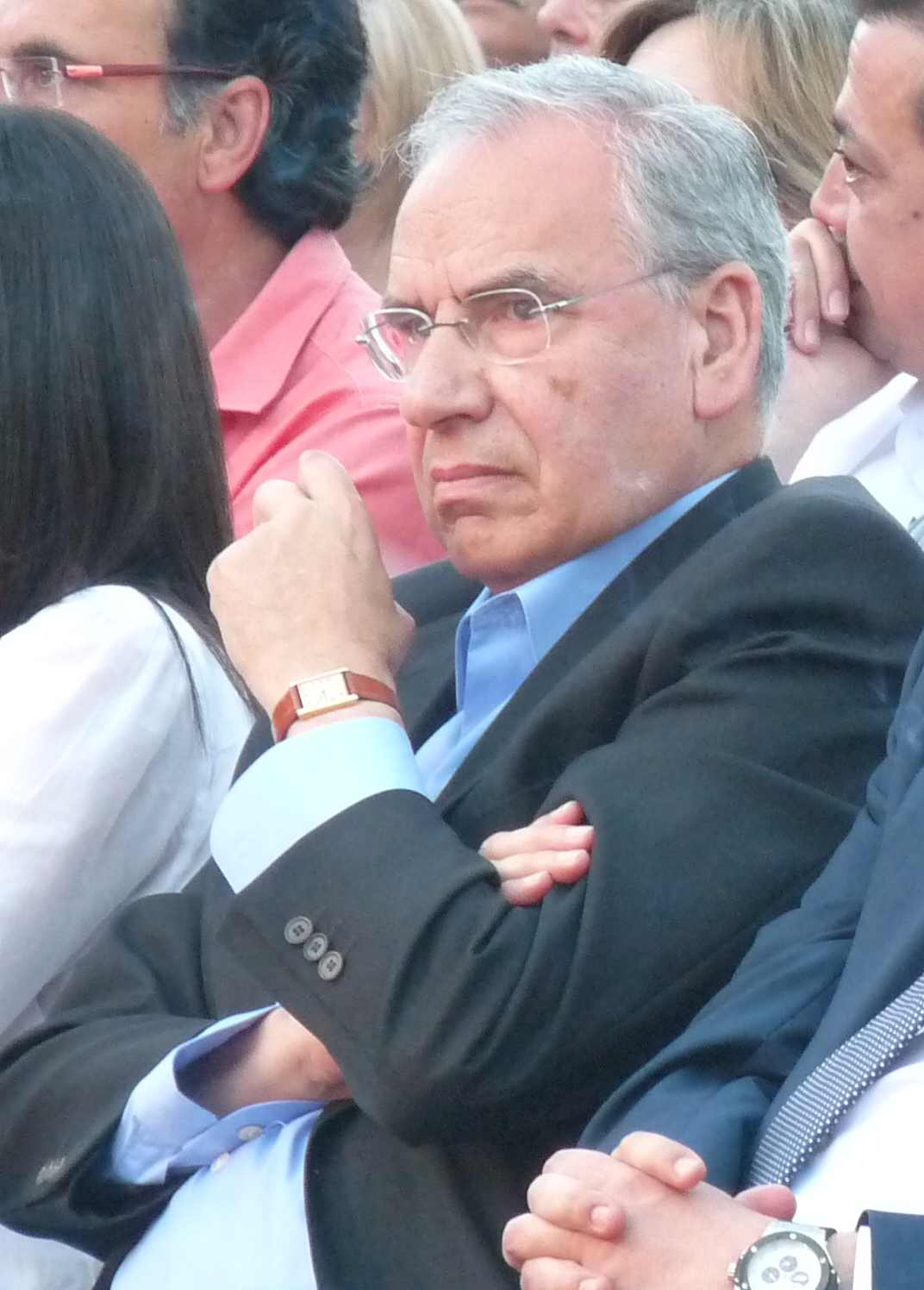 dríguAlfonso Guerra en un acto público del PSOE en Badajoz